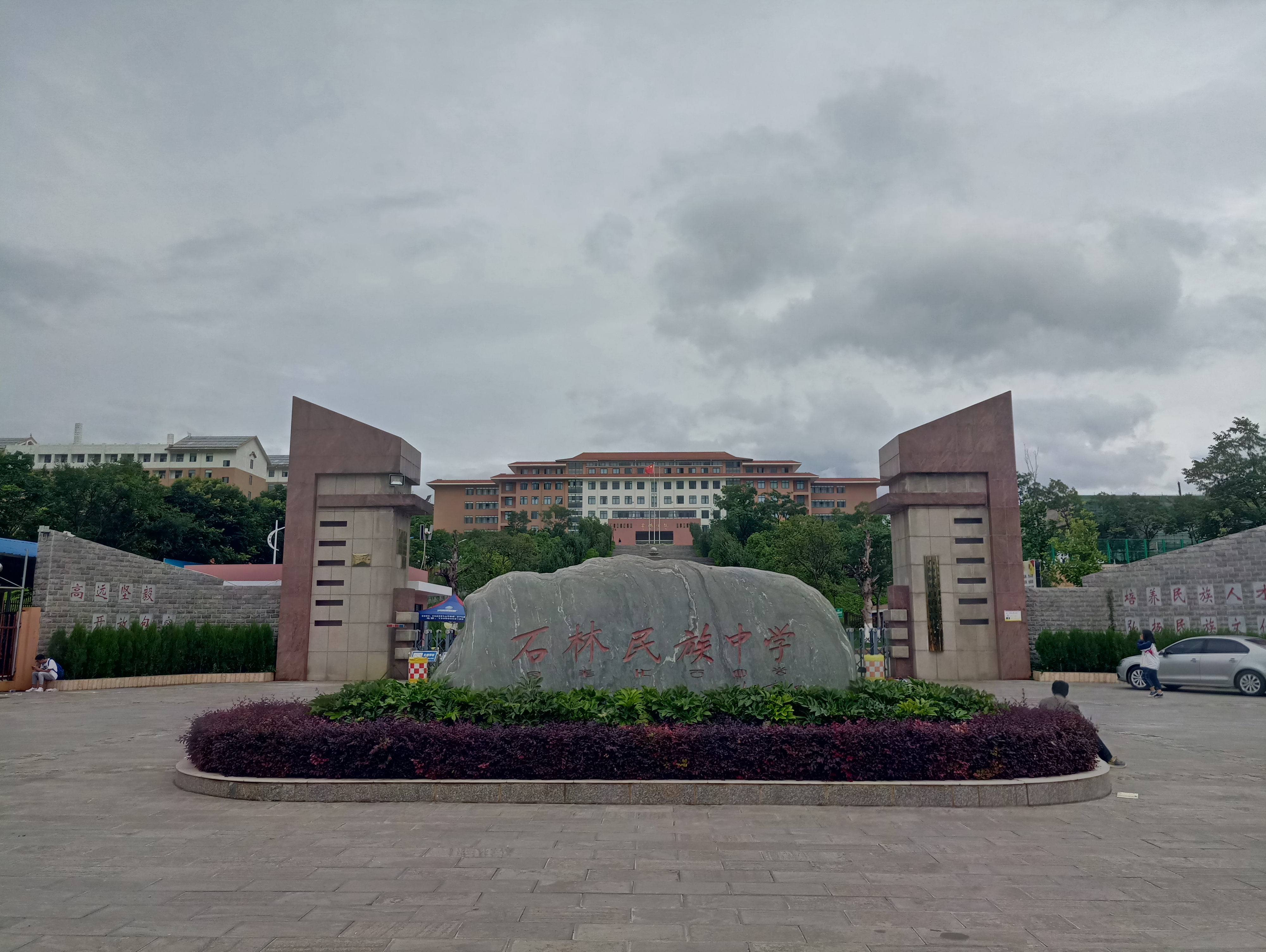 中文（中国大陆）: 石林民族中学